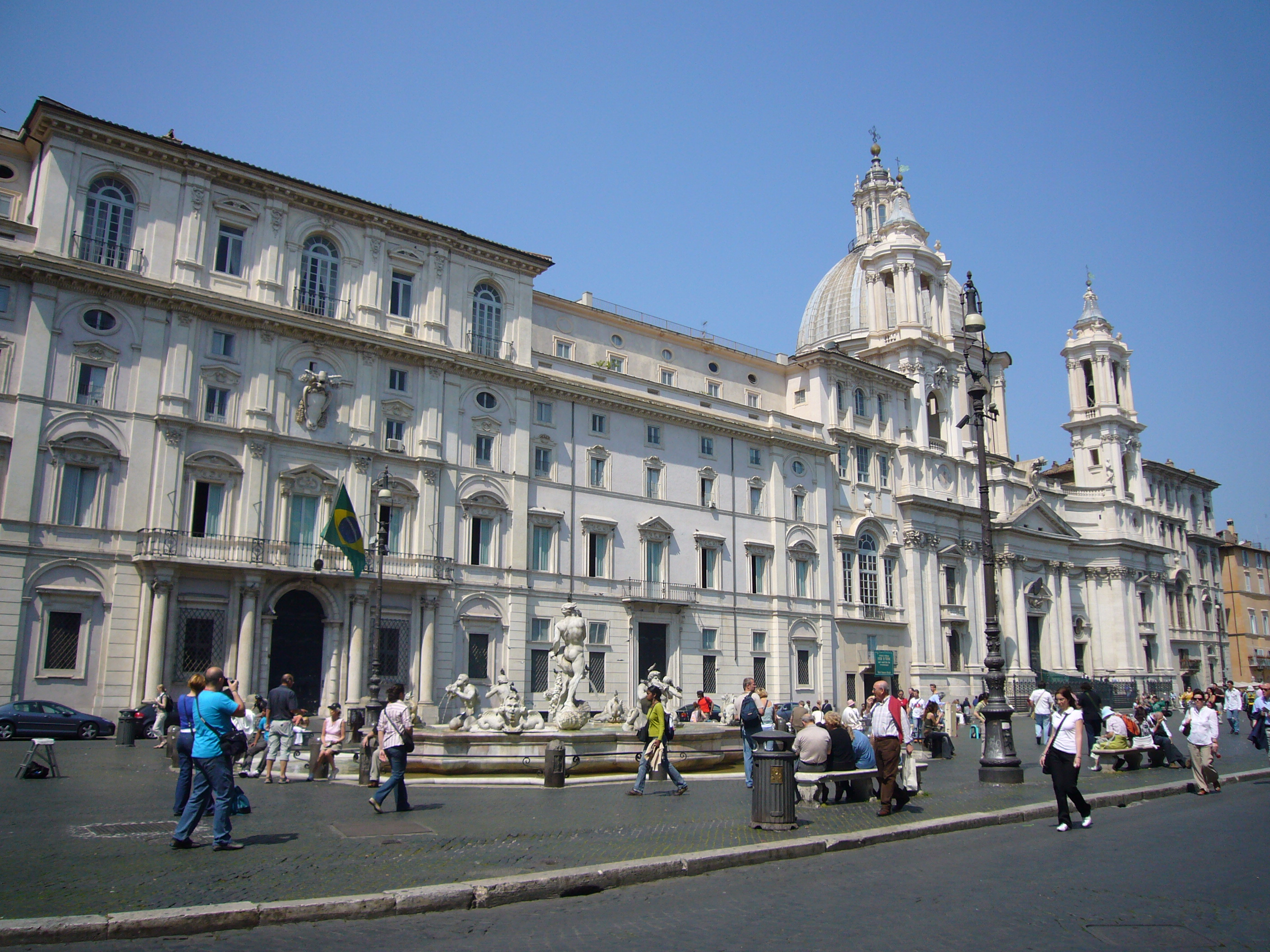 Roma, piazza Navona: Palazzo Pamphilij (ora ambasciata del Brasile) e Sant'Agnese in Agone